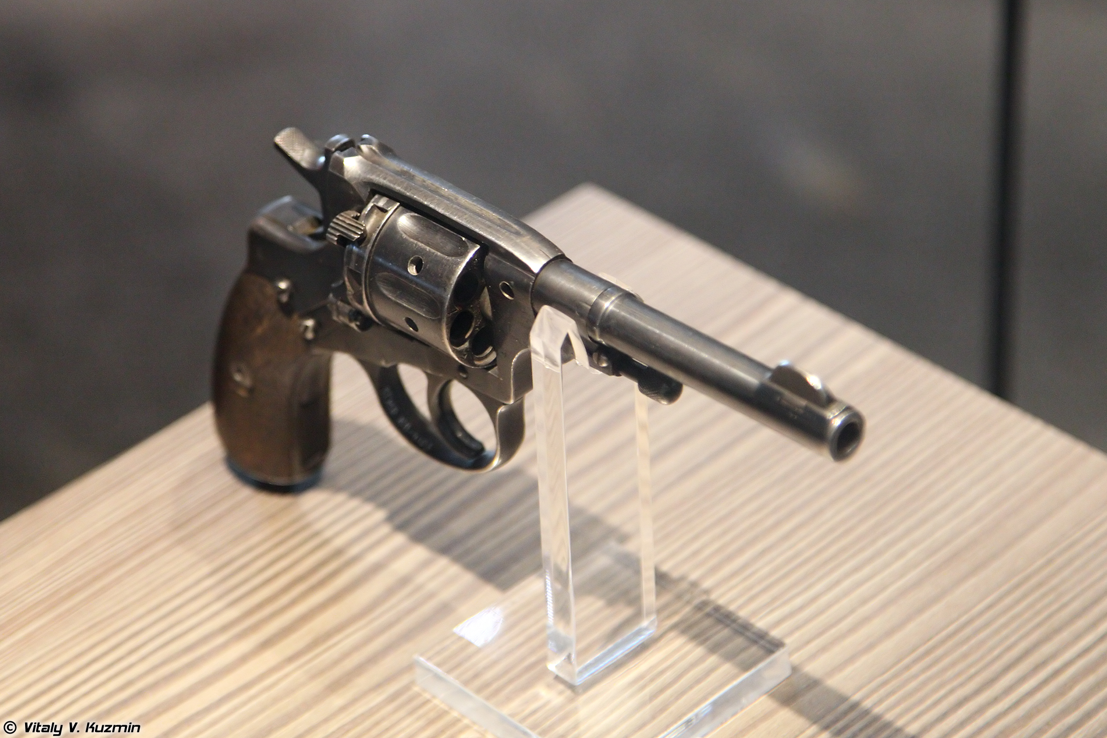 Револьвер солдатский Нагана обр. 1895